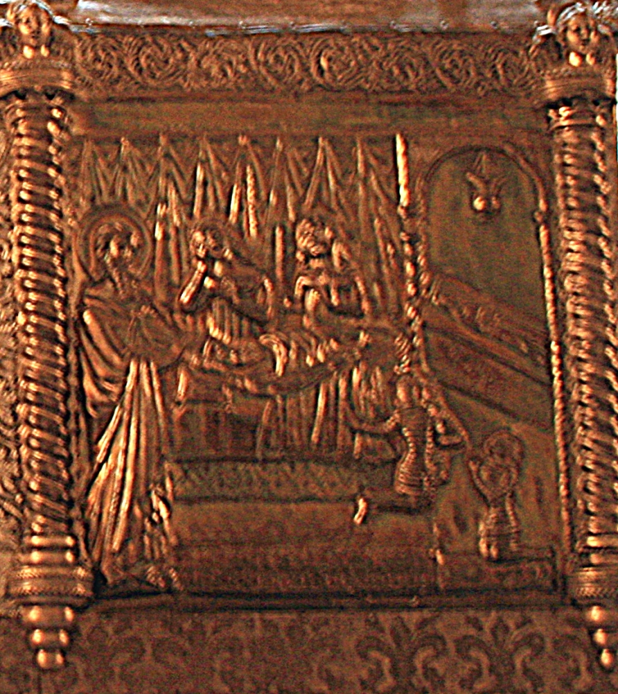 Replika škrinje Svetoga Šimuna u auli Hrvatske akademije znanosti i umjetnosti u Zagrebu. Smrt bosanskog bana Stjepana II. Kotromanića u prisutnosti Sv. Šimuna.